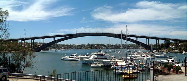 Gladesville Bridge, Sydney, Australia